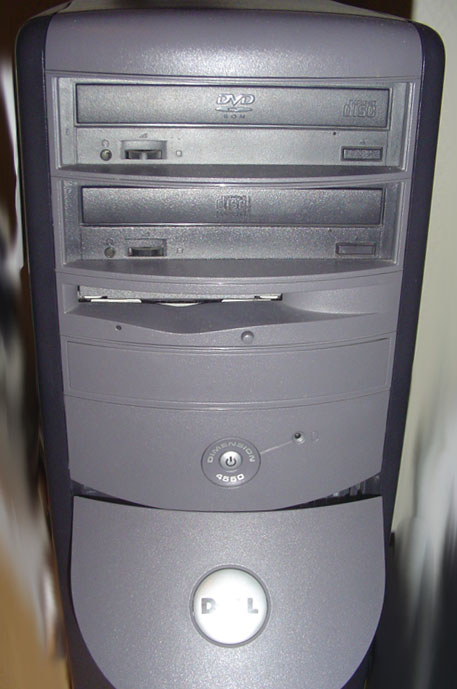 zelf gemaakt